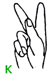 Buchstabe K im deutschen Fingeralphabet, gemäß einer Infokarte des Landesverbandes Bayern der Gehörlosen e.V. (